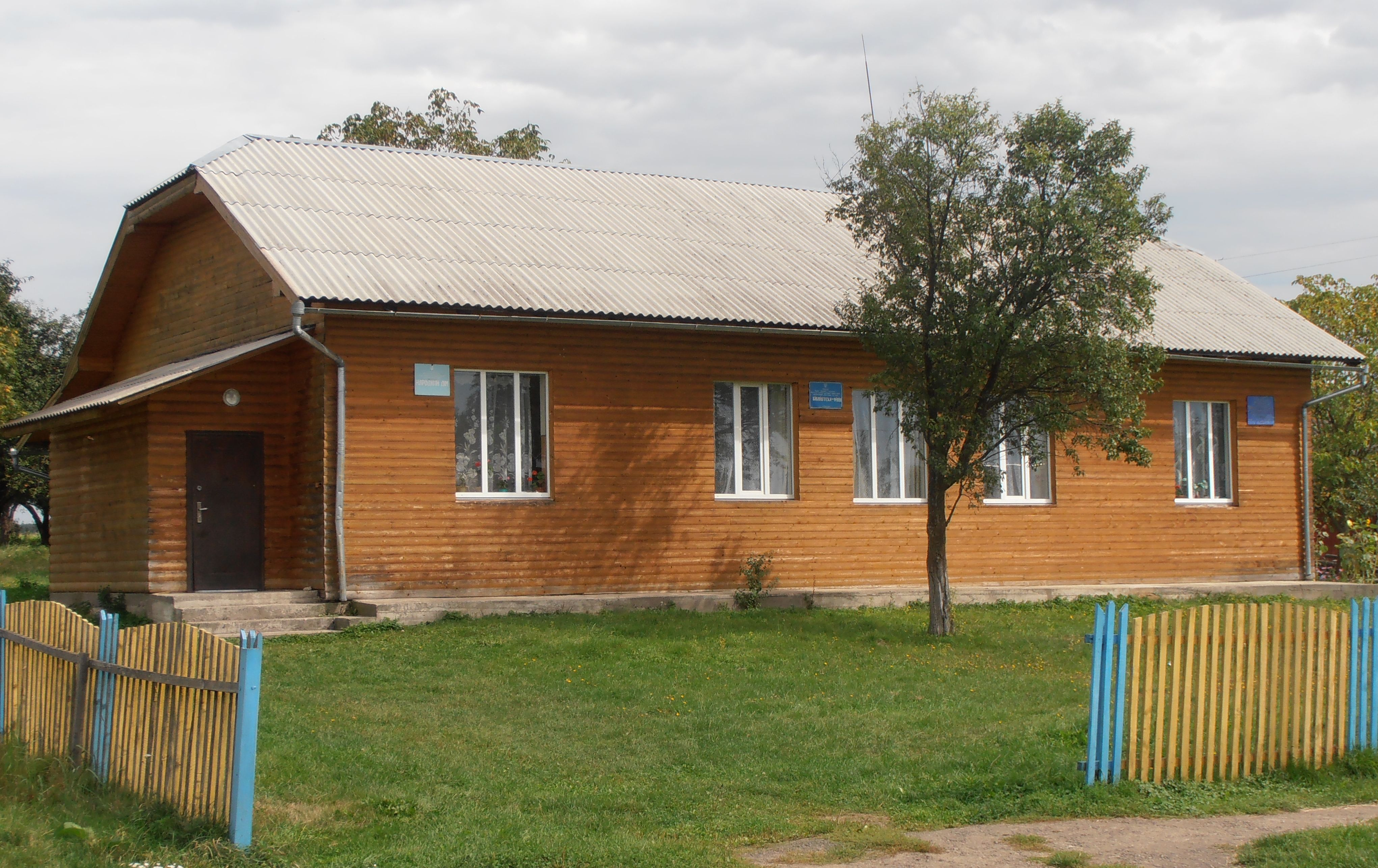 Клуб Бібліотека ФАП